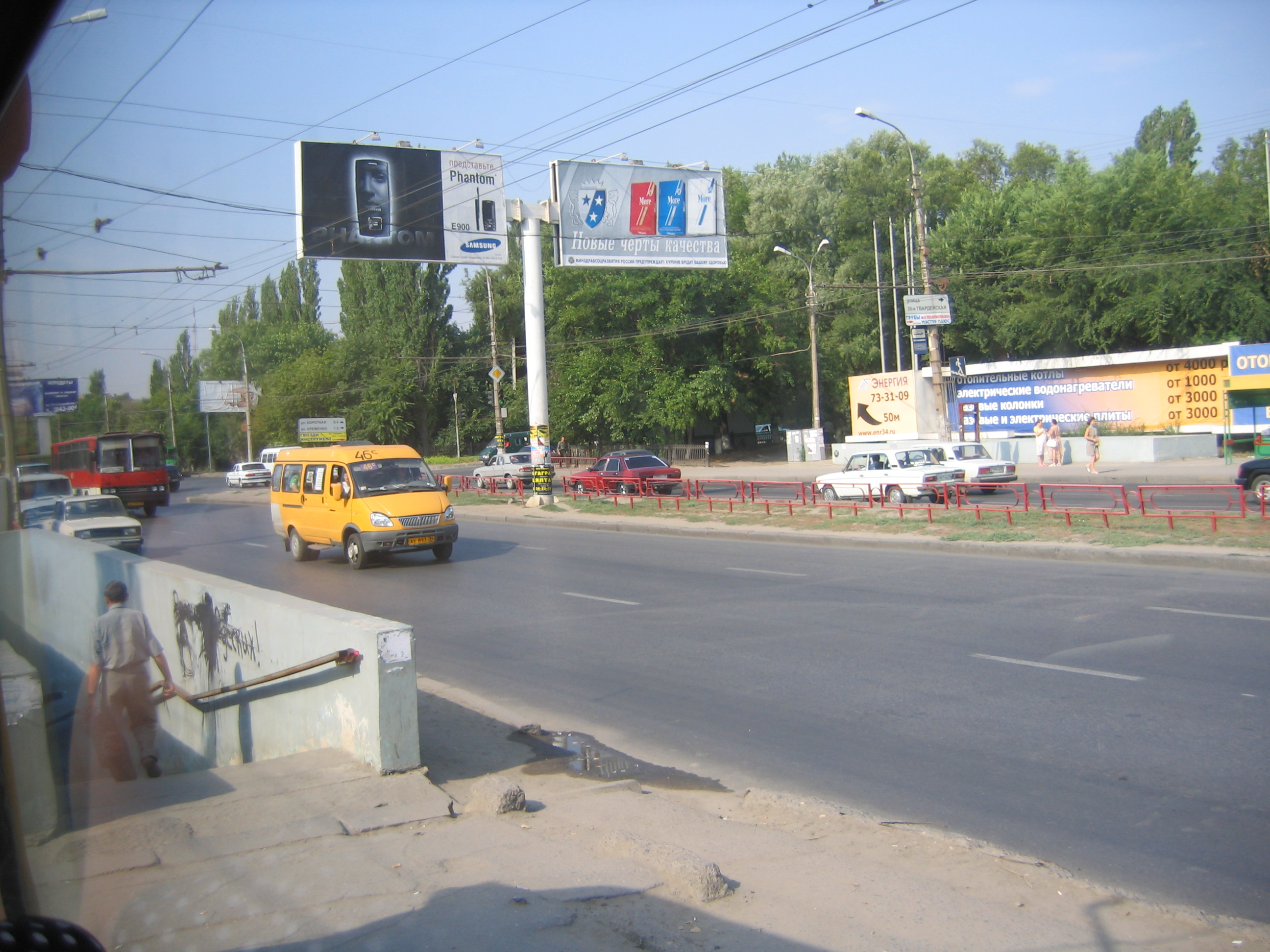 Станция Волгоградского метротрама "Улица имени 39-й гвардейской дивизии" ("39-я Гвардейская"), вид из окна трамвая на платформу станции и перекрёсток пропекта Ленина с улицей имени 39-й гвардейской дивизии